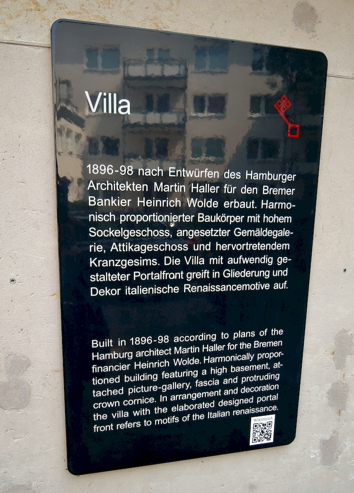 Villa Wolde in Bremen, Architektur-Informationstafel mit QRpedia-Code zu Villa Wolde, Juli 2018